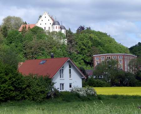 Schloss Warthausen 2004 selbstfotografiert 23.5.2004 Bild ist unter der GNU FDL zur weiteren Verwendung freigegeben